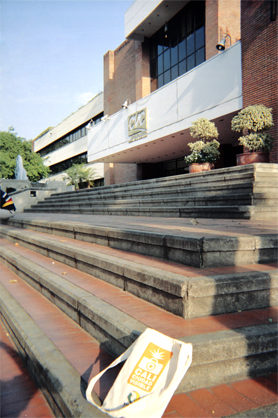 Fachada del edificio de la CVC en la avenida Guadalupe. Toma diagonal. En primer plano mochila del proyecto Cali Ciudad Visible. Plano medio.